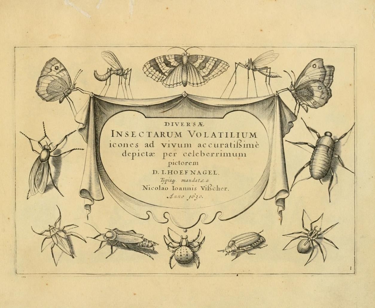 Diversæ insectarum volatilium : icones ad vivum accuratissmè depictæ per celeberrimum pictorem / D.I. Hoefnagel.